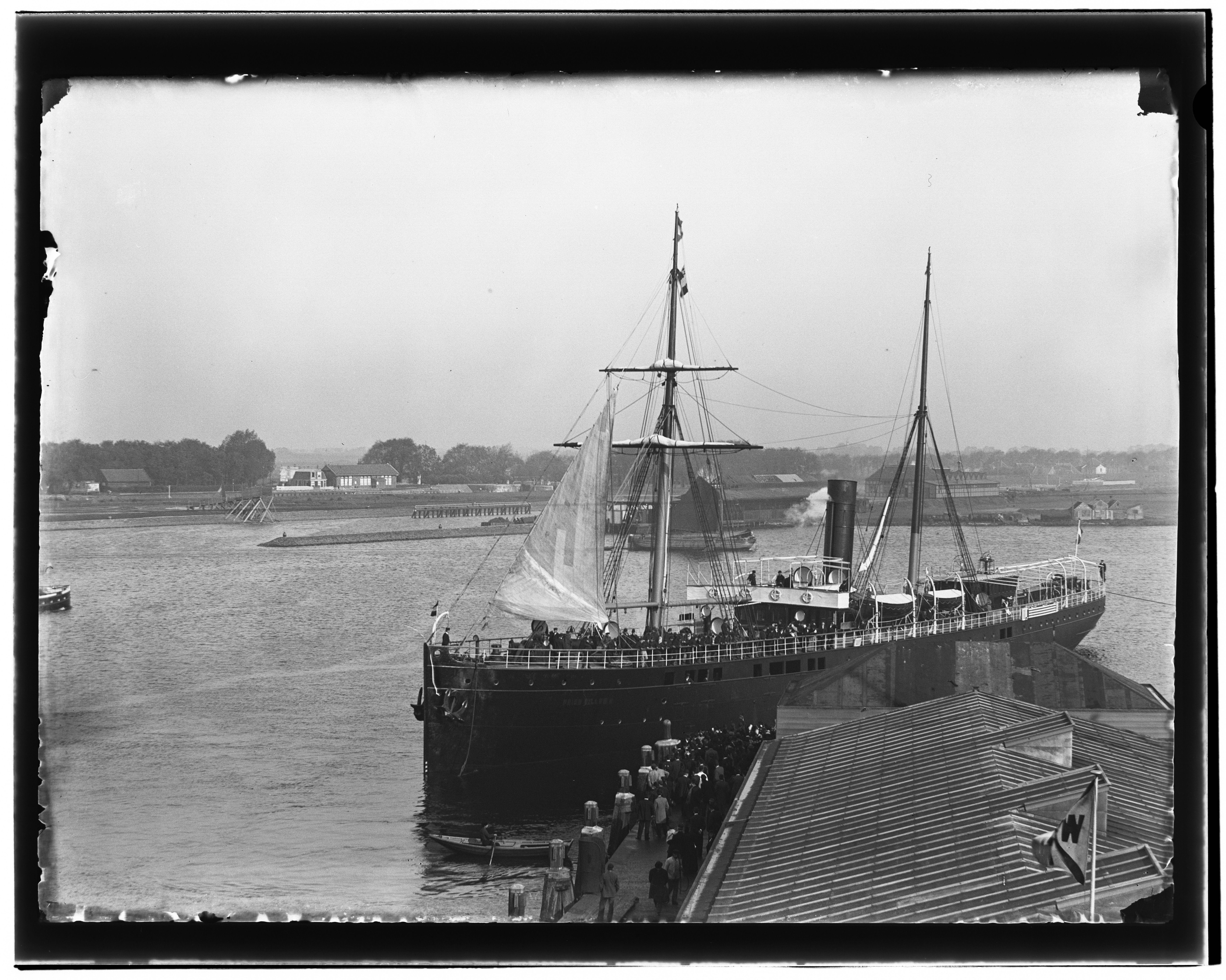 Beschrijving Op het Afgesloten IJ Vertrekt het SS "Willem II" vanaf steiger West Indische Maildienst Gezien naar Buiksloterweg en voorhaven van de Willemsluizen``, gezien van de De Ruijterkade. Documenttype foto Vervaardiger Olie``, Jacob (1834-1905) Collectie Collectie Jacob Olie Jbz. Datering 8 oktober 1896 Geografische naam Buiksloterdijk De Ruijterkade IJ Inventarissen Afbeeldingsbestand 10019A001255 Generated with Dememorixer